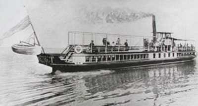 Ausflugsdampfer